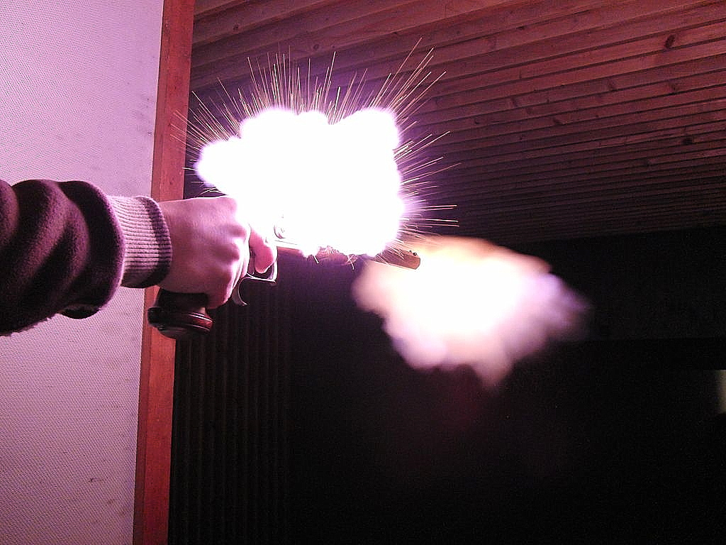 Steinschlosspistole Le Page beim Zünden